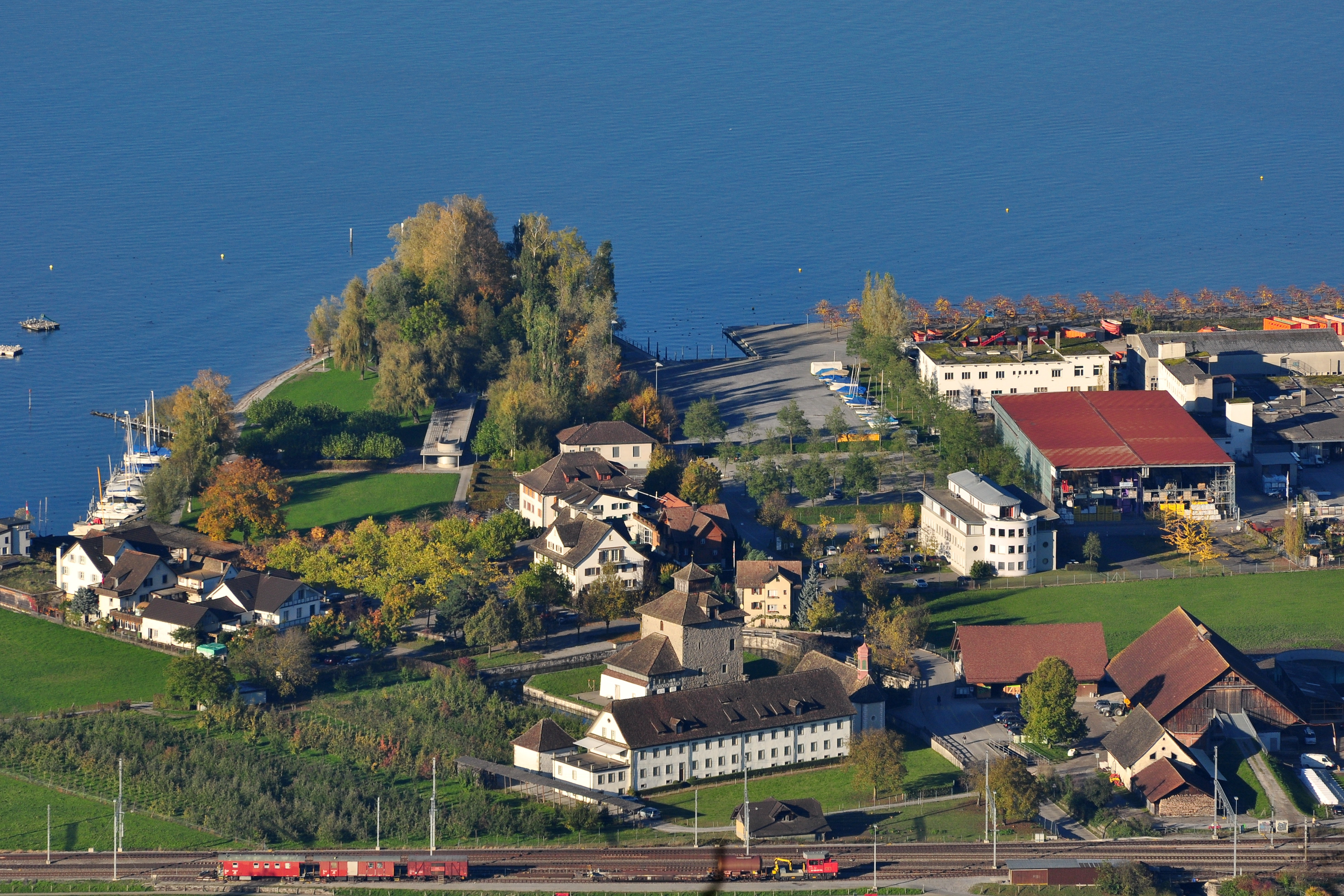 Schloss in Pfäffikon (SZ) as seen from Etzel mountain (Switzerland)